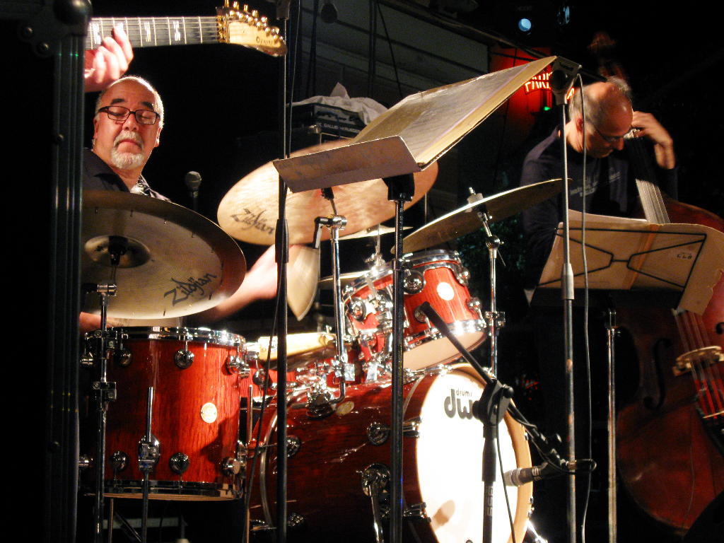 Peter Erskine Michel Benita